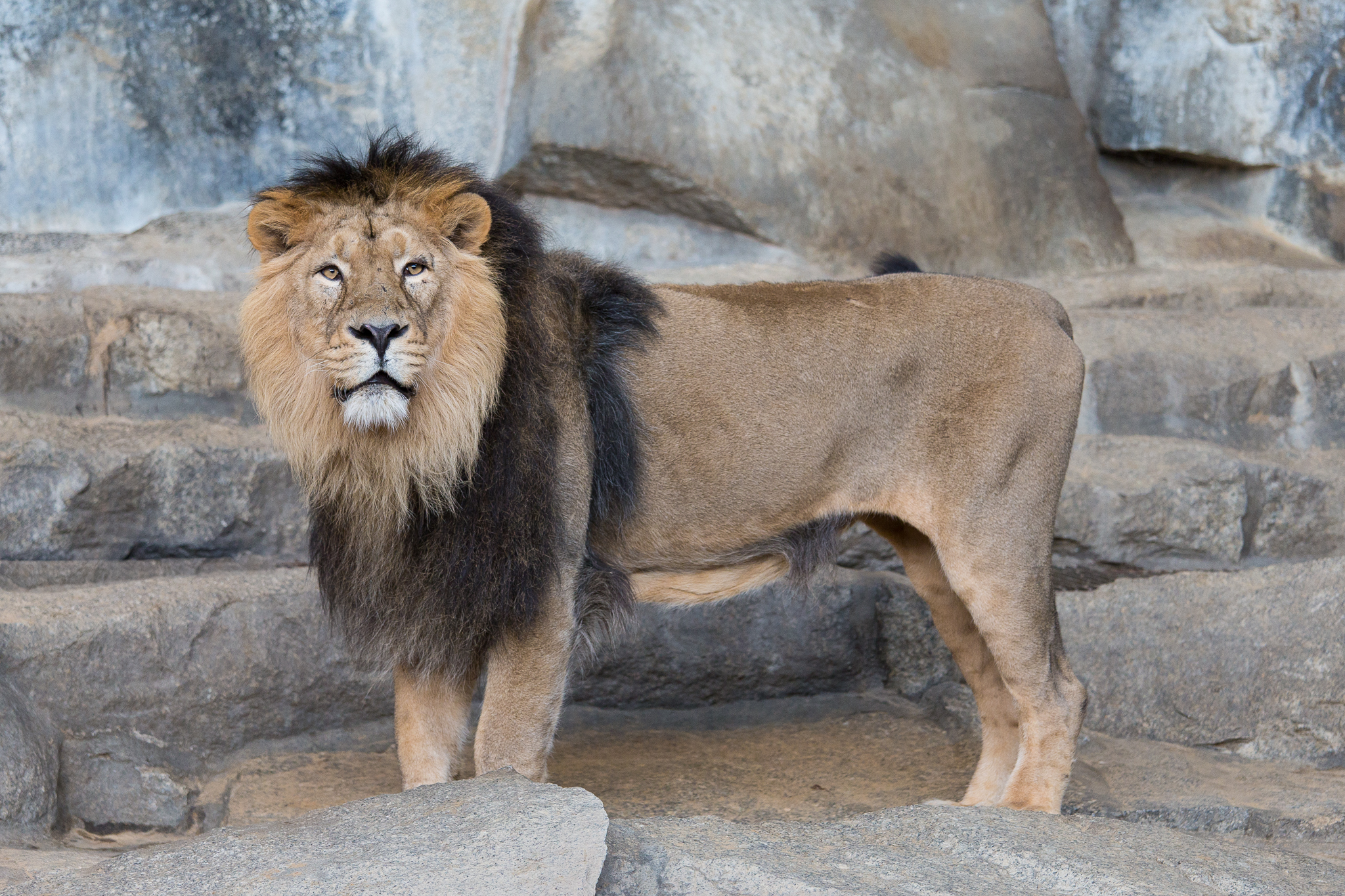 Indischer (asiatischer) Löwe im Tierpark Berlin